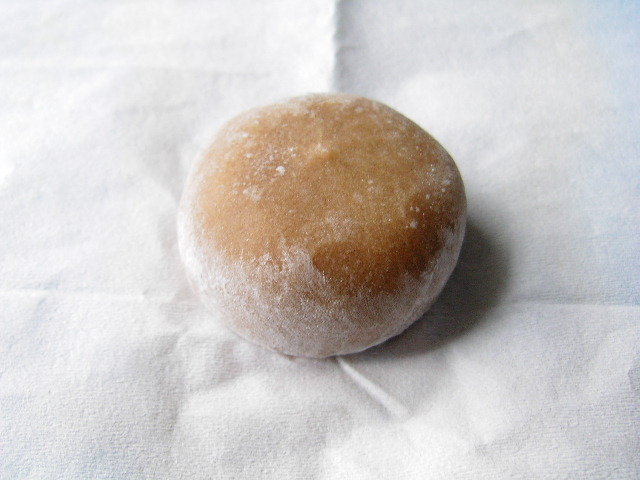 綾部市あやべ温泉の地元特産品取扱い売店にて購入した栃餅。京都丹波高原国定公園内の入会地にあるトチノキから採取した栃の実を用いた手作り。餅に苦味とエグ味がある分、餡の甘さを引き立たせる。